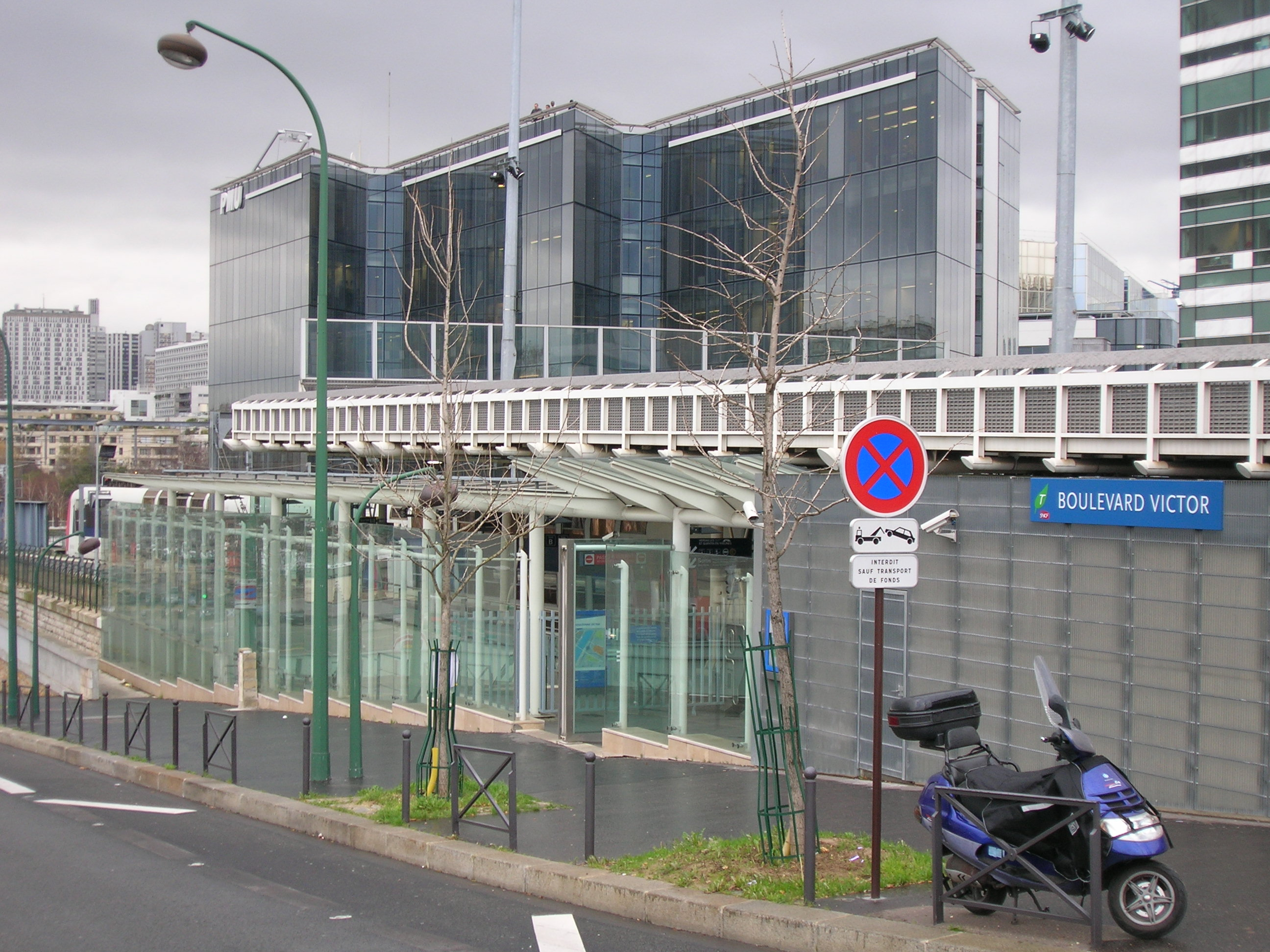 Extérieur de la gare RER du Bd Victor, côté Quai André Citroën.